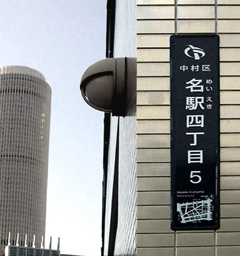 中村区名駅の番地表示 左背景に見えるのはja:名古屋駅のJRセントラルタワーズ 2004年12月、名古屋市ja:中村区ja:名駅にて投稿者が撮影 画像形式 JPEG形式 横480×縦640pixel 色数24bit (16,777,216色) Category:中村区の画像